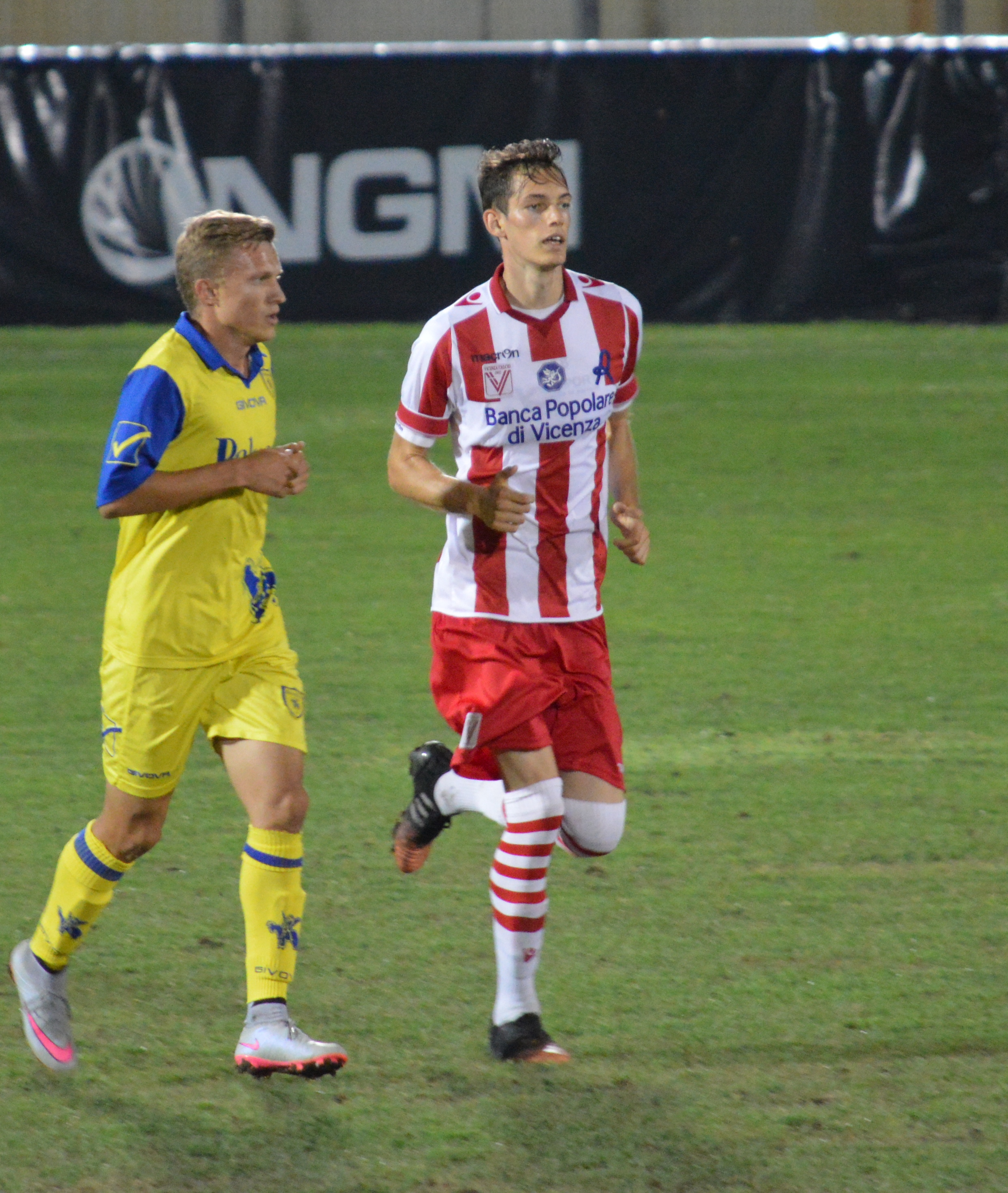 Modic con la maglia del Vicenza